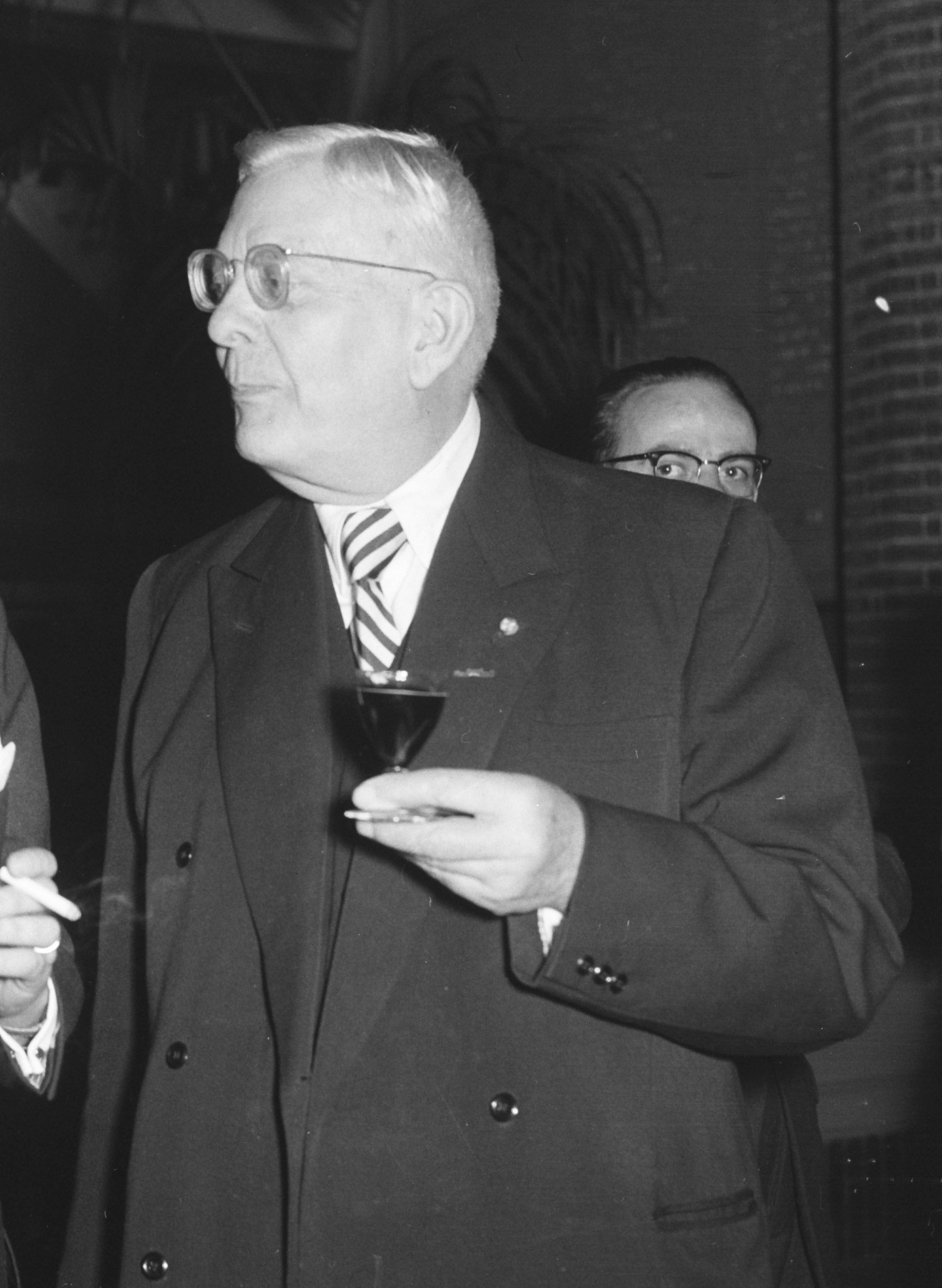 Collectie / Archief : Fotocollectie Anefo Reportage / Serie : [ onbekend ] Beschrijving : Veertig jarig jubileum Amsterdams Lyceum , receptie. Oprichter dr. C. P. Grinning Datum : 25 januari 1957 Locatie : Amsterdam Trefwoorden : jubilea, scholen Persoonsnaam : Grinning, C.P. Fotograaf : Bilsen, Joop van / Anefo Auteursrechthebbende : Nationaal Archief Materiaalsoort : Negatief (zwart/wit) Nummer archiefinventaris : bekijk toegang 2.24.01.04 Bestanddeelnummer : 908-2703